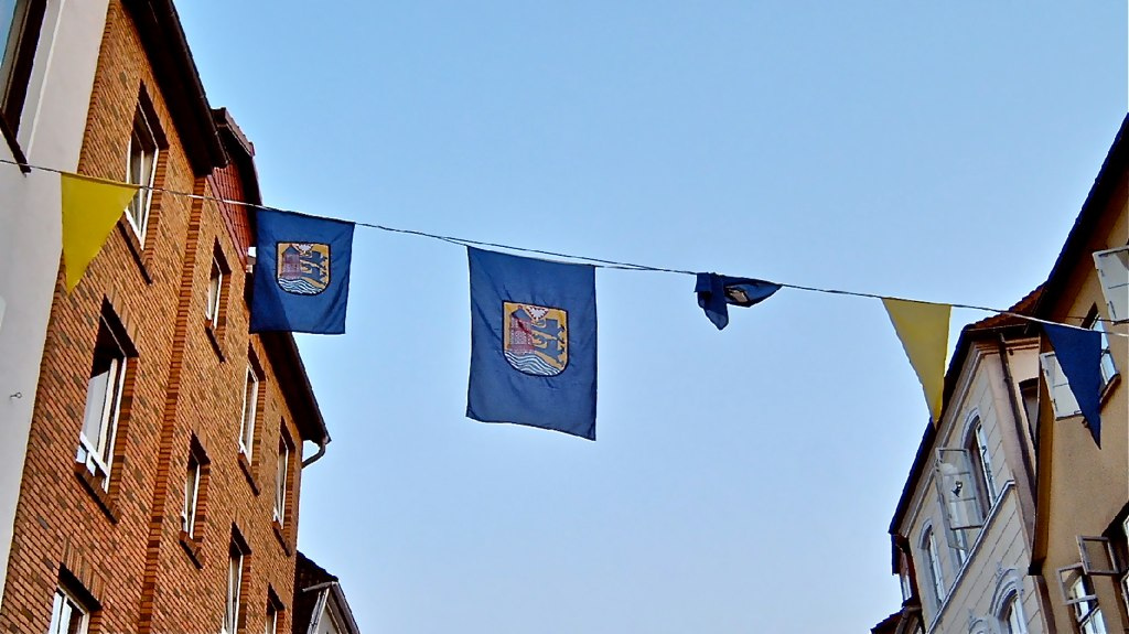 Wappen so weit das Auge reicht. ( Foto aufgenommen in der Norderstraße in Flensburg)